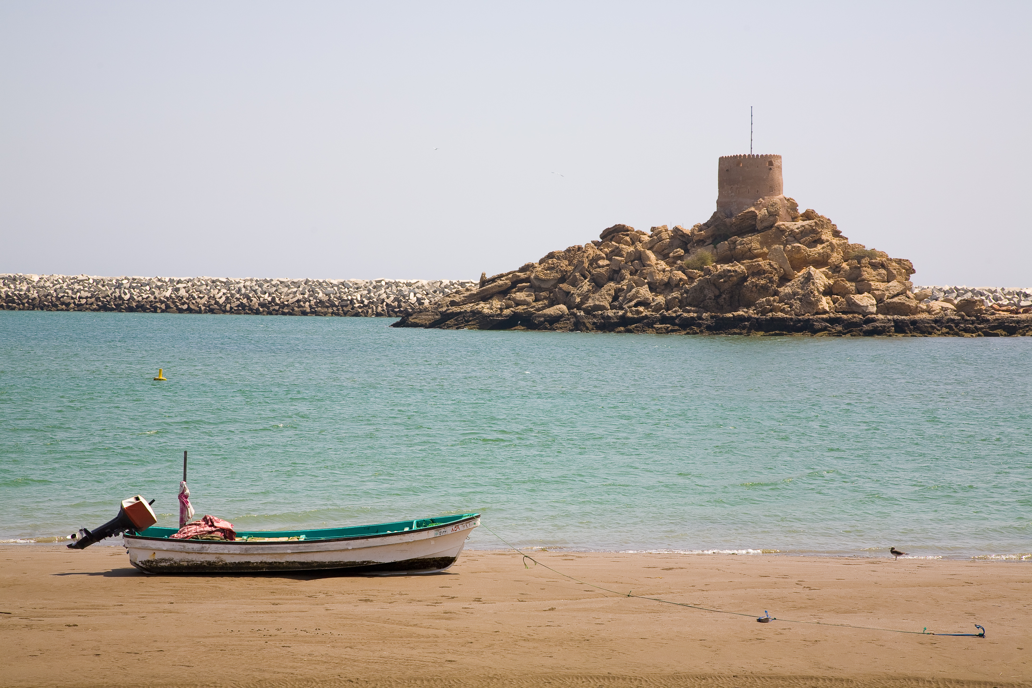 Qurayyat, Oman